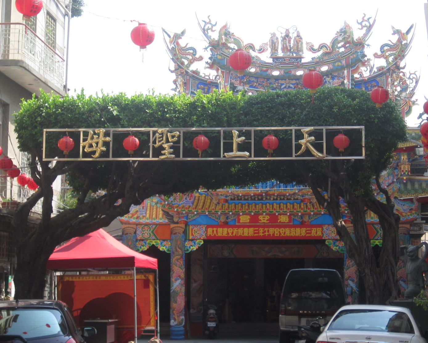 臺南海安宮